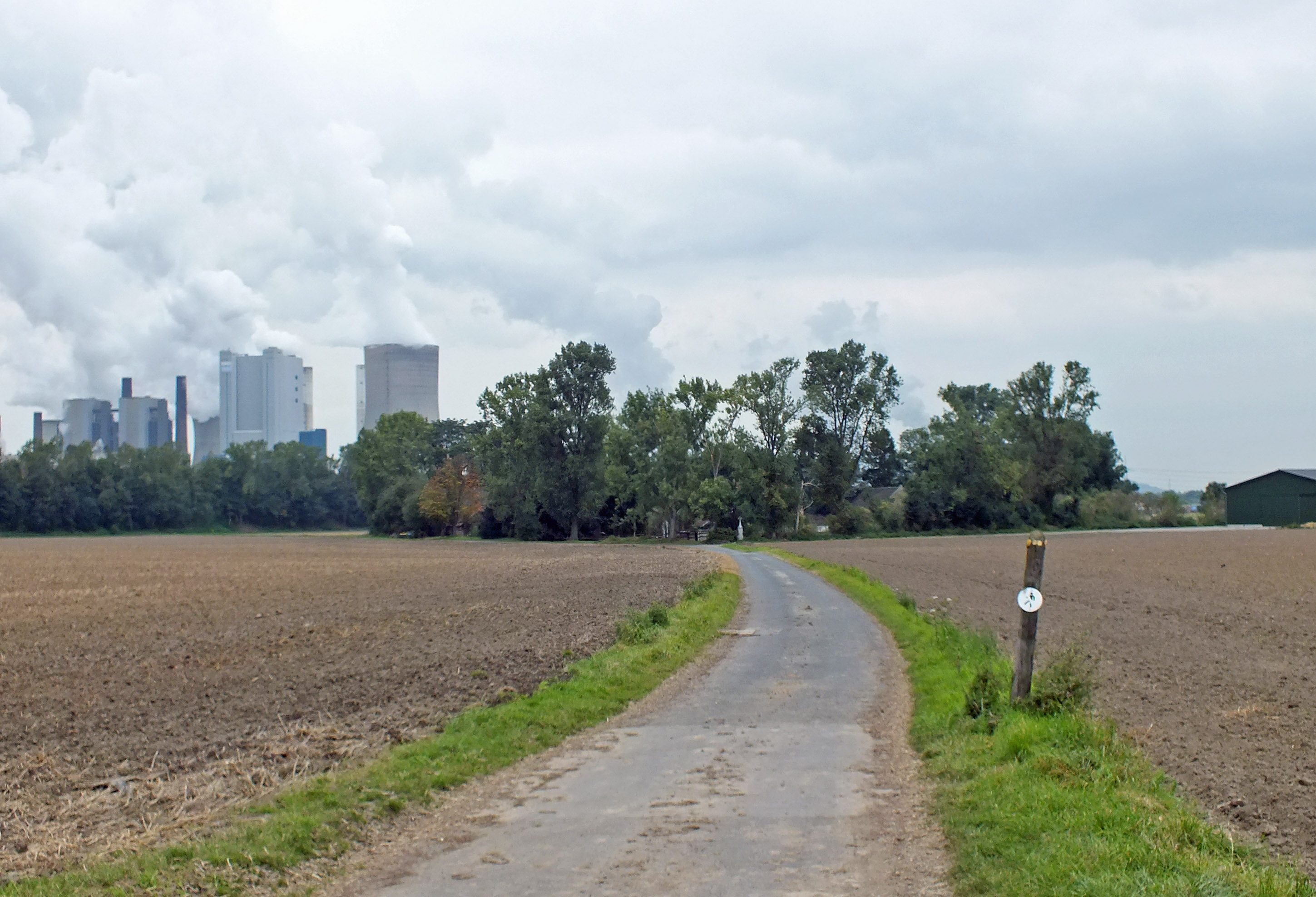 Niederaußem, Gut Asperschlag, Denkmal 51; nur über Privatweg erreichbar This is a photograph of an architectural monument.